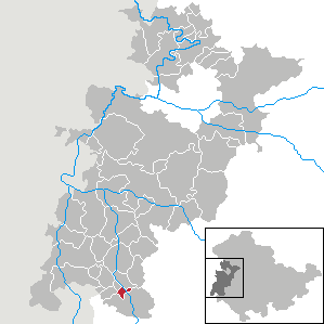 Diedorf in Thuringia - Wartburgkreis